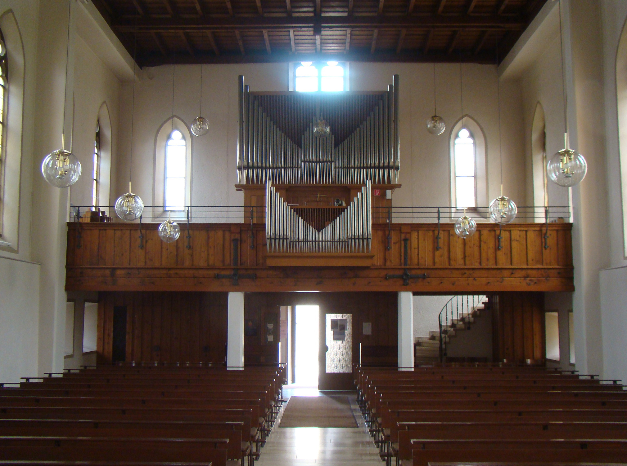 Kath. Kirche Mariä Himmelfahrt in Talheim (Lkr. Heilbronn)